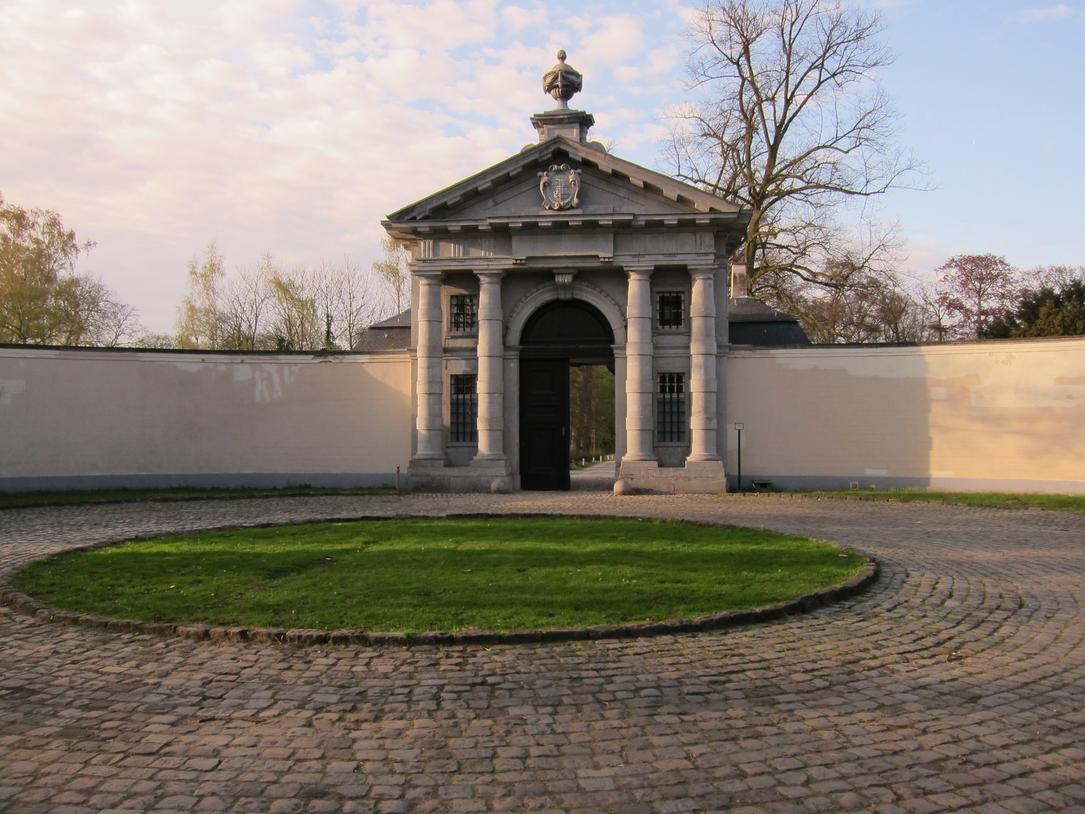 Het Poorthuis Domein Rosendael St.Kathelijne-Waver